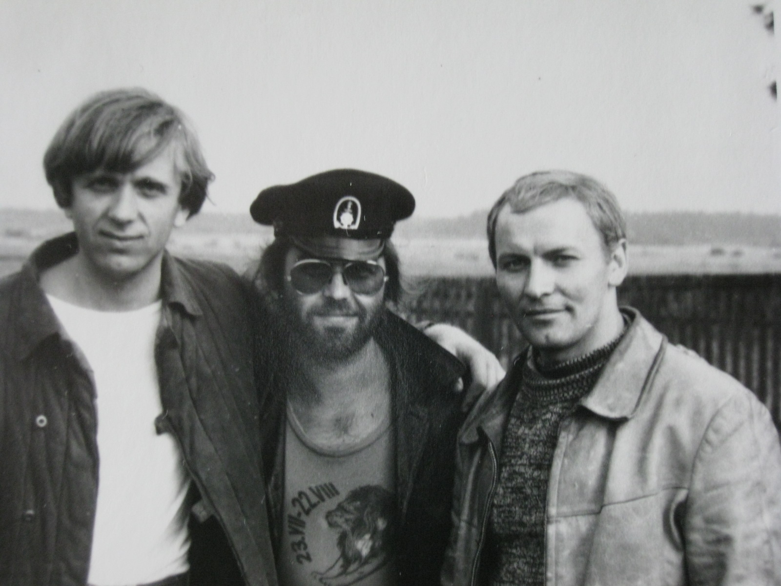 На съёмочной площадке фильма «Родное дело»: актёр Евгений Стеблов, режиссёр Александр Ефремов, актёр Геннадий Егоров.